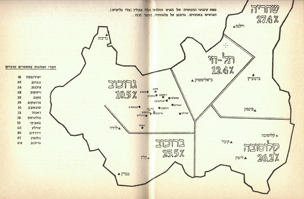 קיבוצי ההכשרה של תנועת 'החלוץ' בפולין